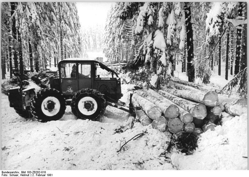 Dreiherrenstein, Holzrücken ADN-ZB Schaar 2.2.1981 Bez. Suhl: Unter erschwerten Bedingungen arbeiten gegenwärtig die Forstarbeiter in den Forstwirtschaftsbetrieben des Bezirks Suhl. Hier in den Wäldern der Oberförsterei Dreiherrnstein haben die Werktätigen des Betriebes Ilmenau, Sitz Gehren, mit Schneehöhen bis zu einem Meter zu kämpfen. Trotz leistungsstarker Technik ist das Rücken und der Transport der Stämme im tiefen Schnee Schwerstarbeit. - siehe auch Z 0202-11 N